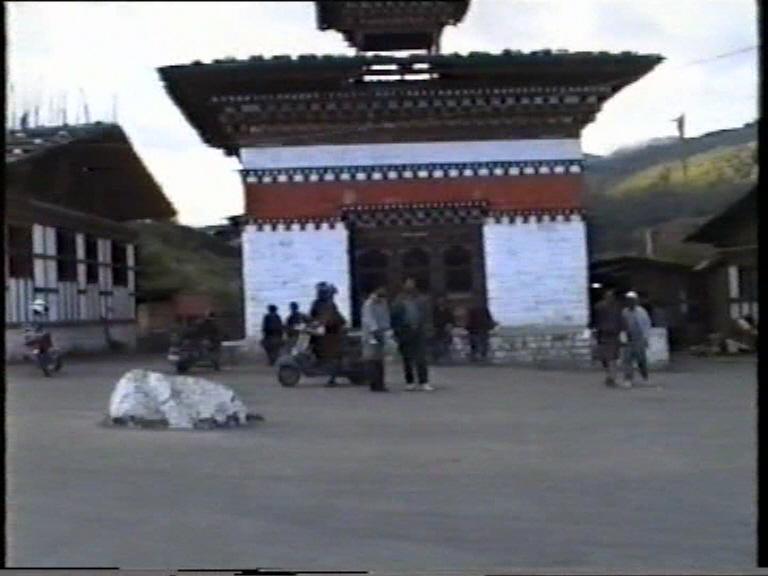 Jakhar Temple, Bhumtang, Bhutan